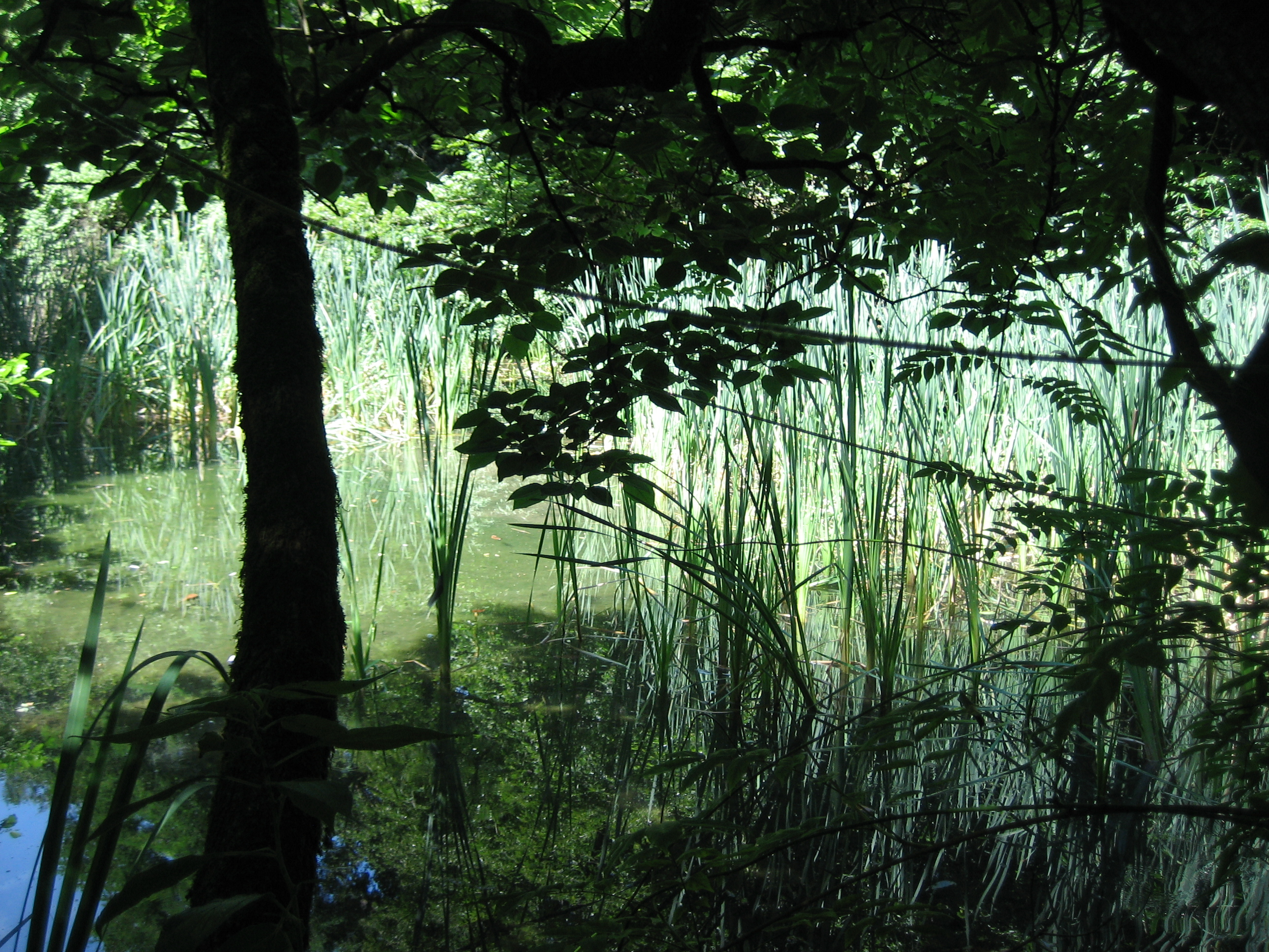 ParcoDelleBertone Goito Mantova Laghetto 2011